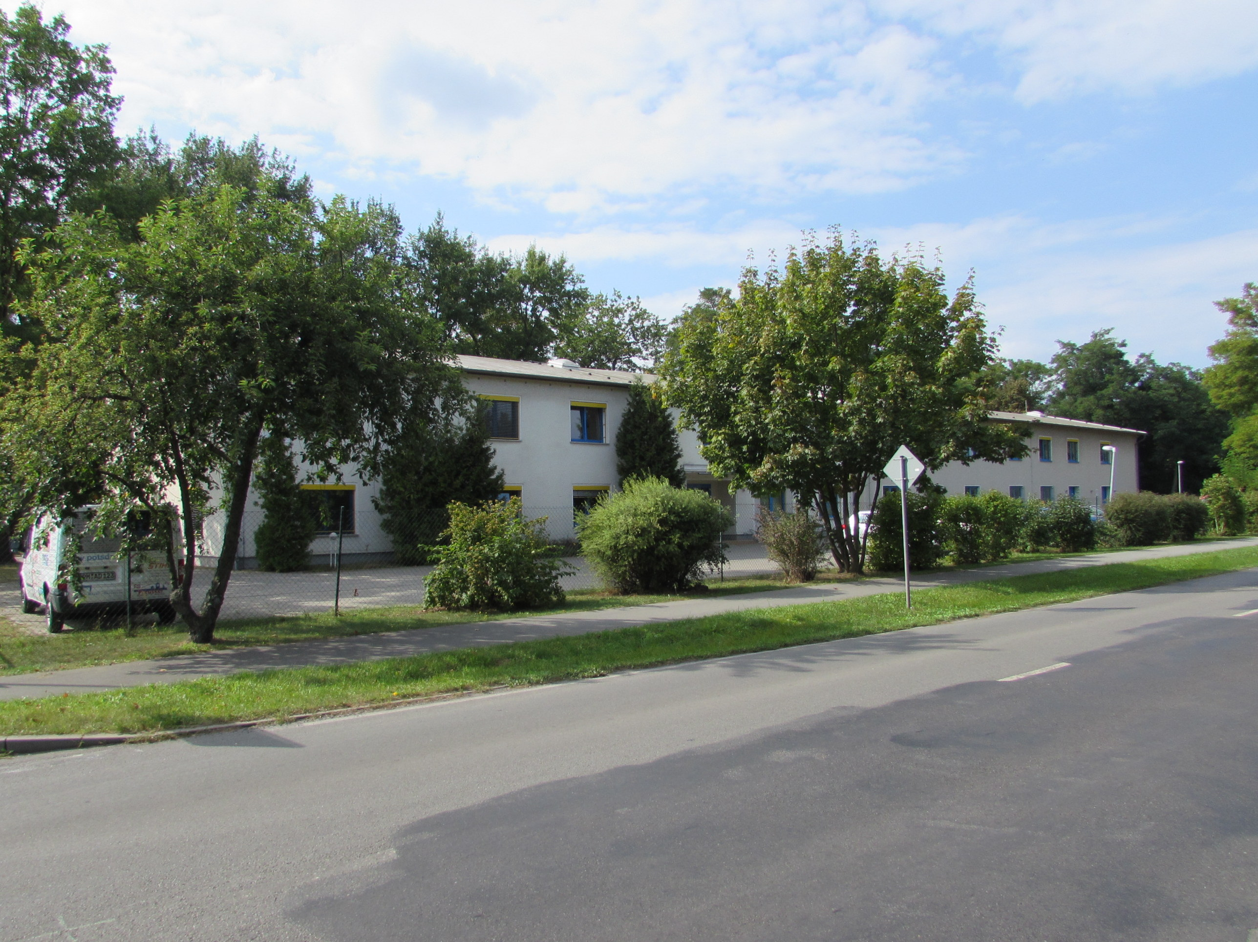 Amtssitz Beetzsee in Brielow ausbau